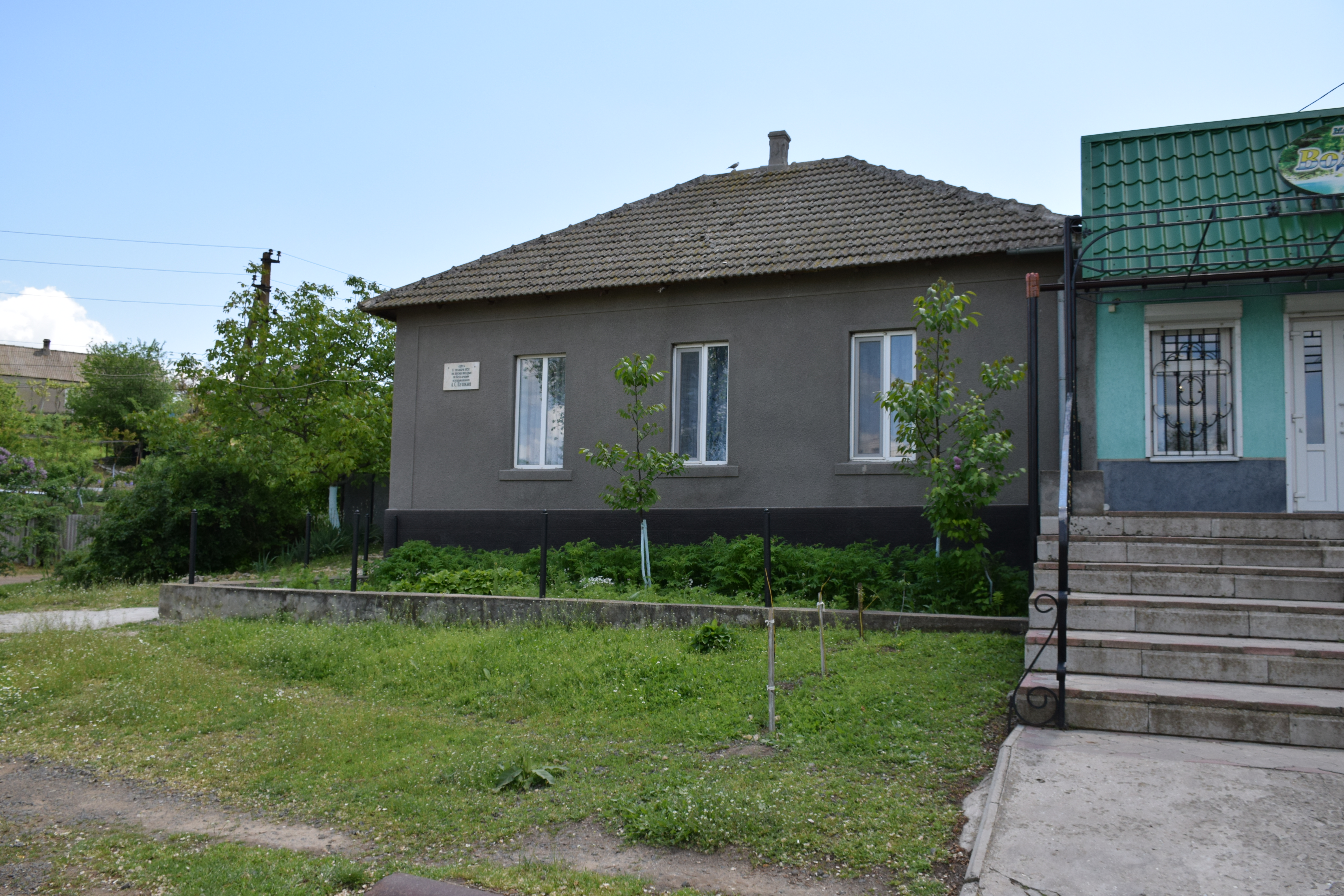 Історичне місце, де зупинявся О.С. Пушкін, Татарбунари, вул. Мельнична